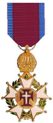 De Orde van van Christus was een in 1317 ingestelde Portugese ridderorde. Eigen tekening, GFDL en cc-by-sa-2.5 Robert Prummel